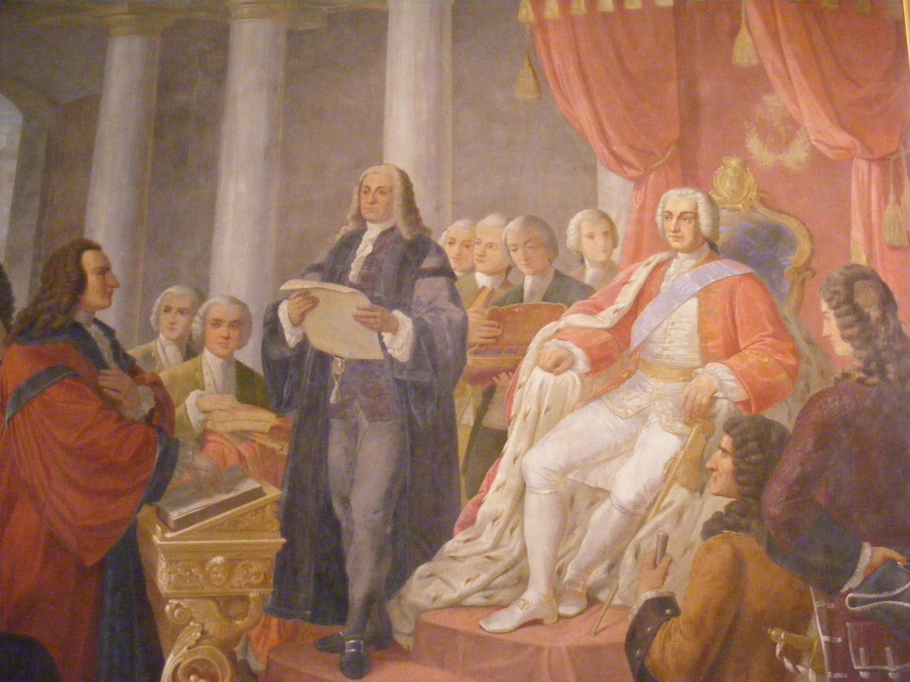 Fresko “Markgraf Friedrich von Bayreuth stiftet 1743 die Universitaet Erlangen”, gemalt von Hugo Barthelme zwischen 1858 und 1867, Staatliches Museum für Völkerkunde München, I. OG